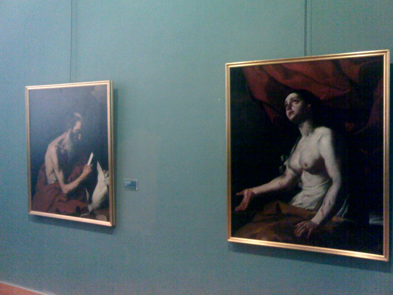 Accademia di Belle Arti di Napoli - La galleria dell'accademia A destra Santa Caterina di Mattia Preti A sinistra San Girolamo di Jusepe de Ribera